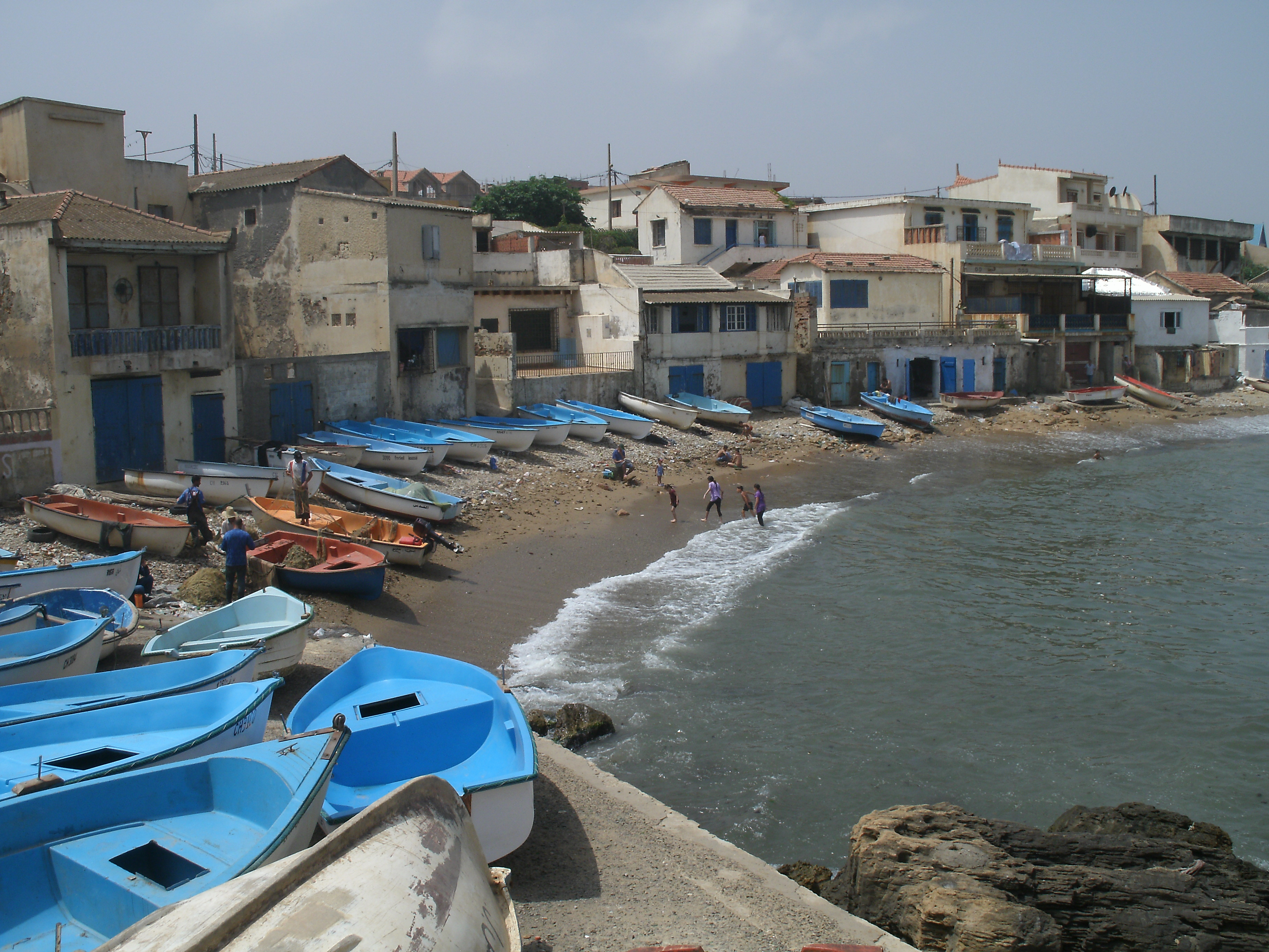 Fouka Marine